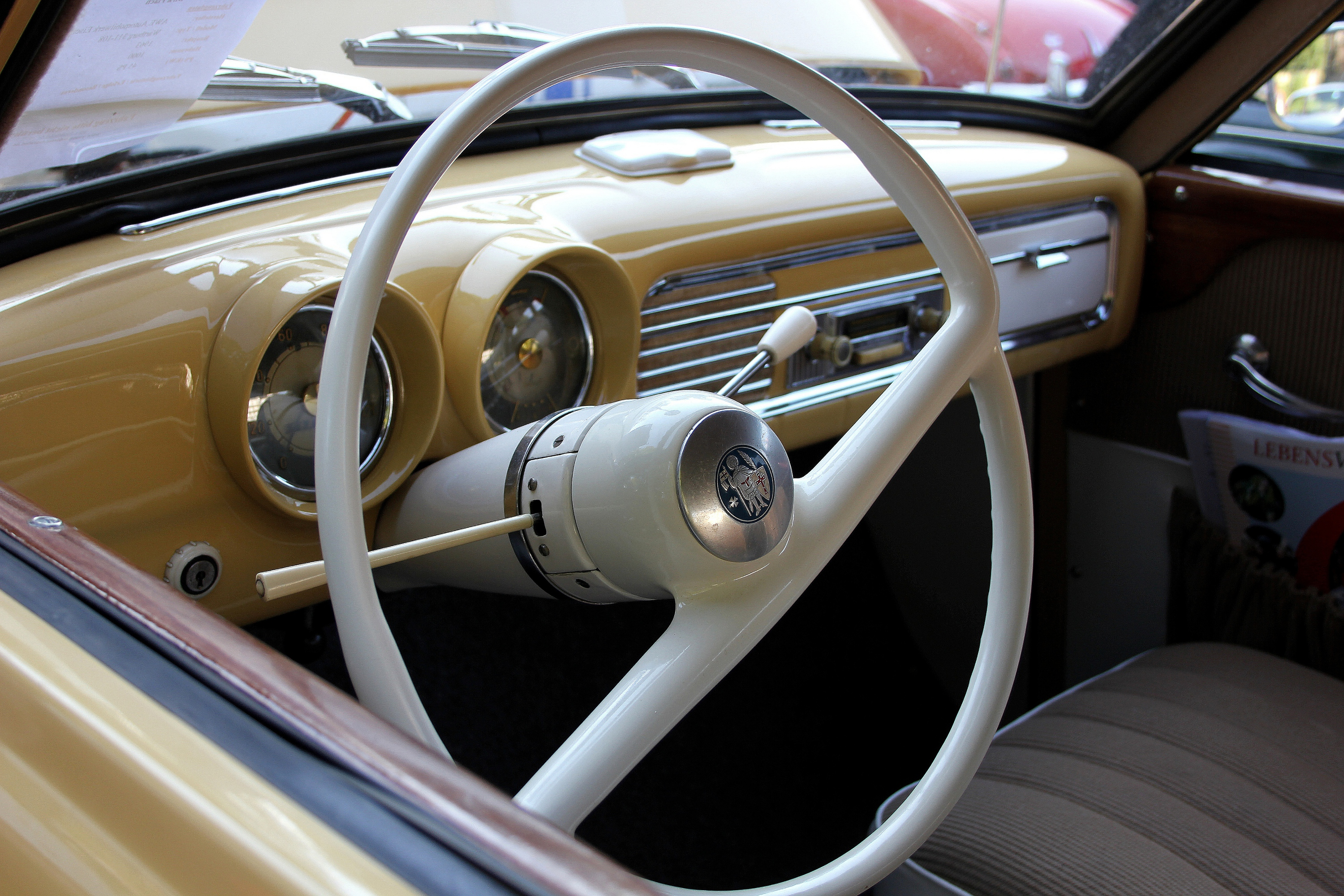 Wartburg 1000, Typ 311-108, Baujahr 1963, bei der Food Rallye in Neuwied